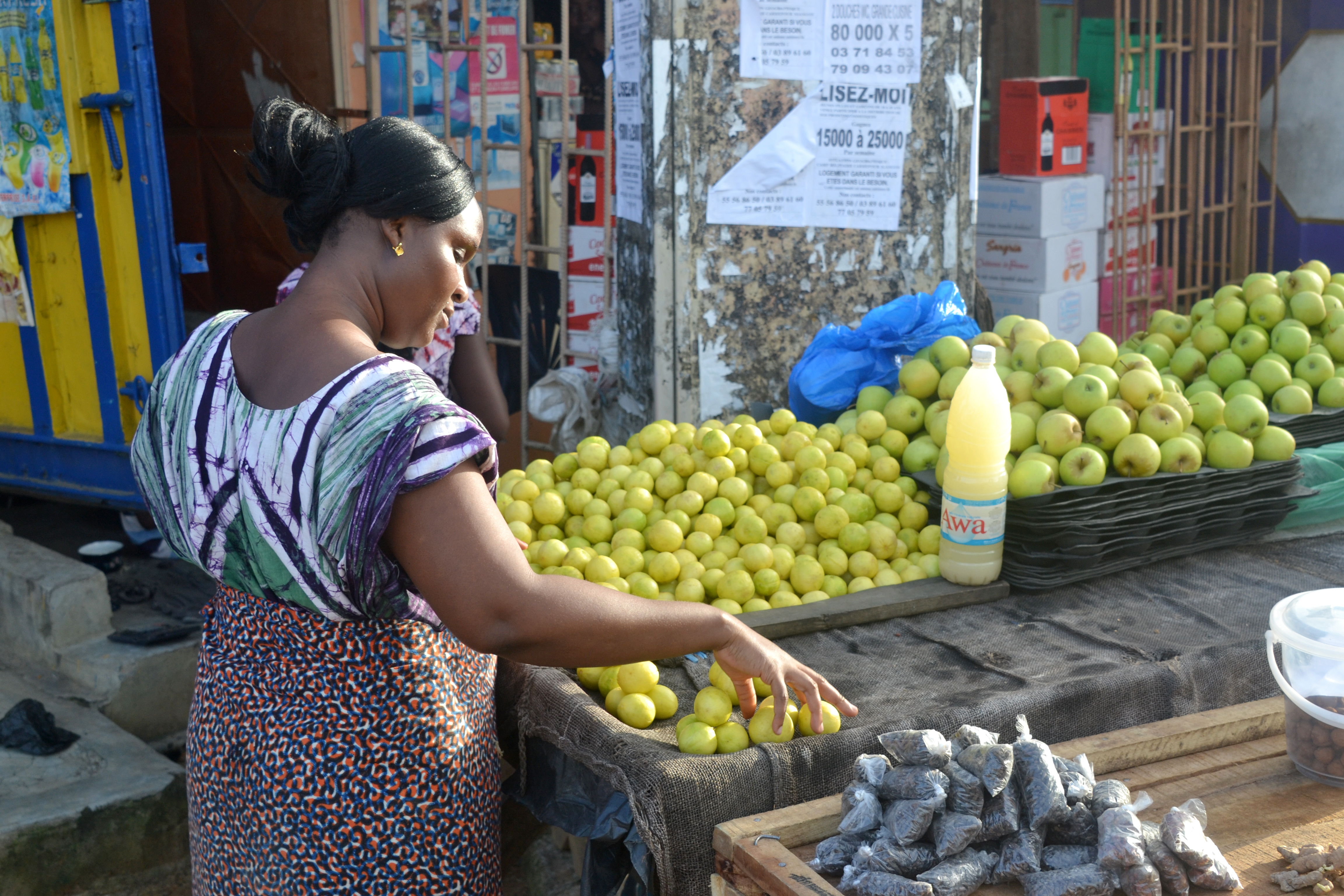 une vendeuse de fruit dans les rues d'Abidjan This is an image of "African people at work" from Ivory Coast